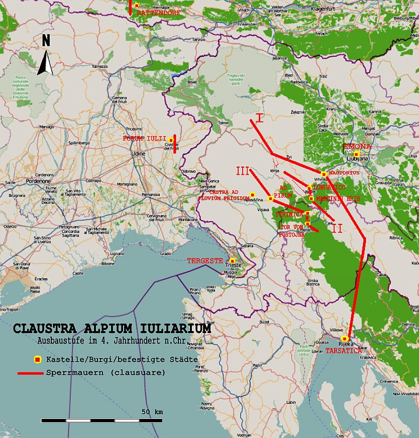 Schematisierte Kartenskizze des Claustra Alpium Iuliarum, Ausbaustufe im 4. Jahrhundert n.Chr.